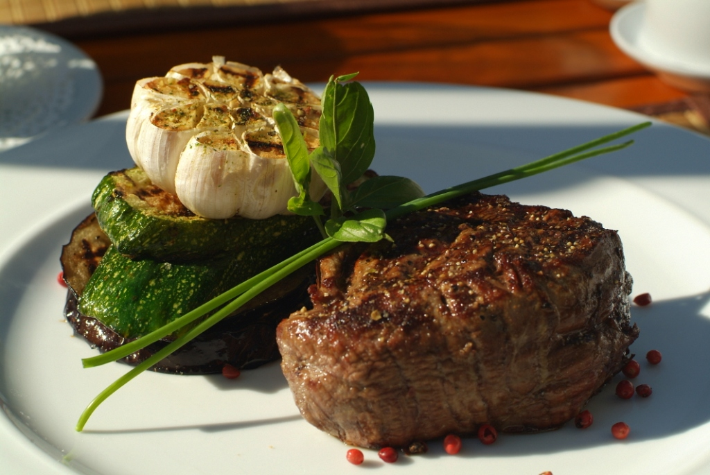 Tradicinis didkepsnis restorane STEAKHOUSE HAZIENDA Fotografas: Egidijus Tutkus. Data: 2009 m.